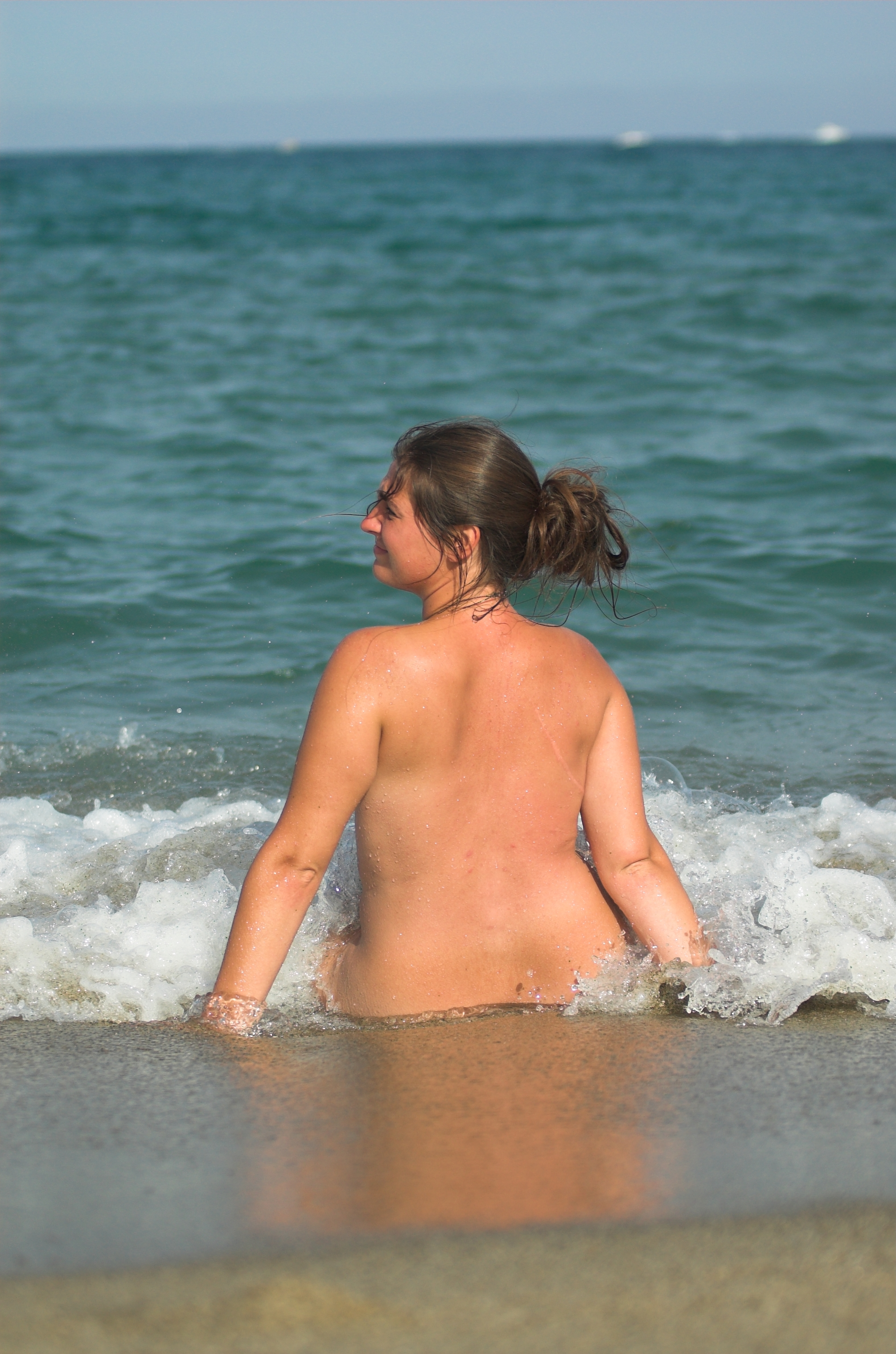 Femme naturiste assise dans la mer, dans le Languedoc-Roussillon.